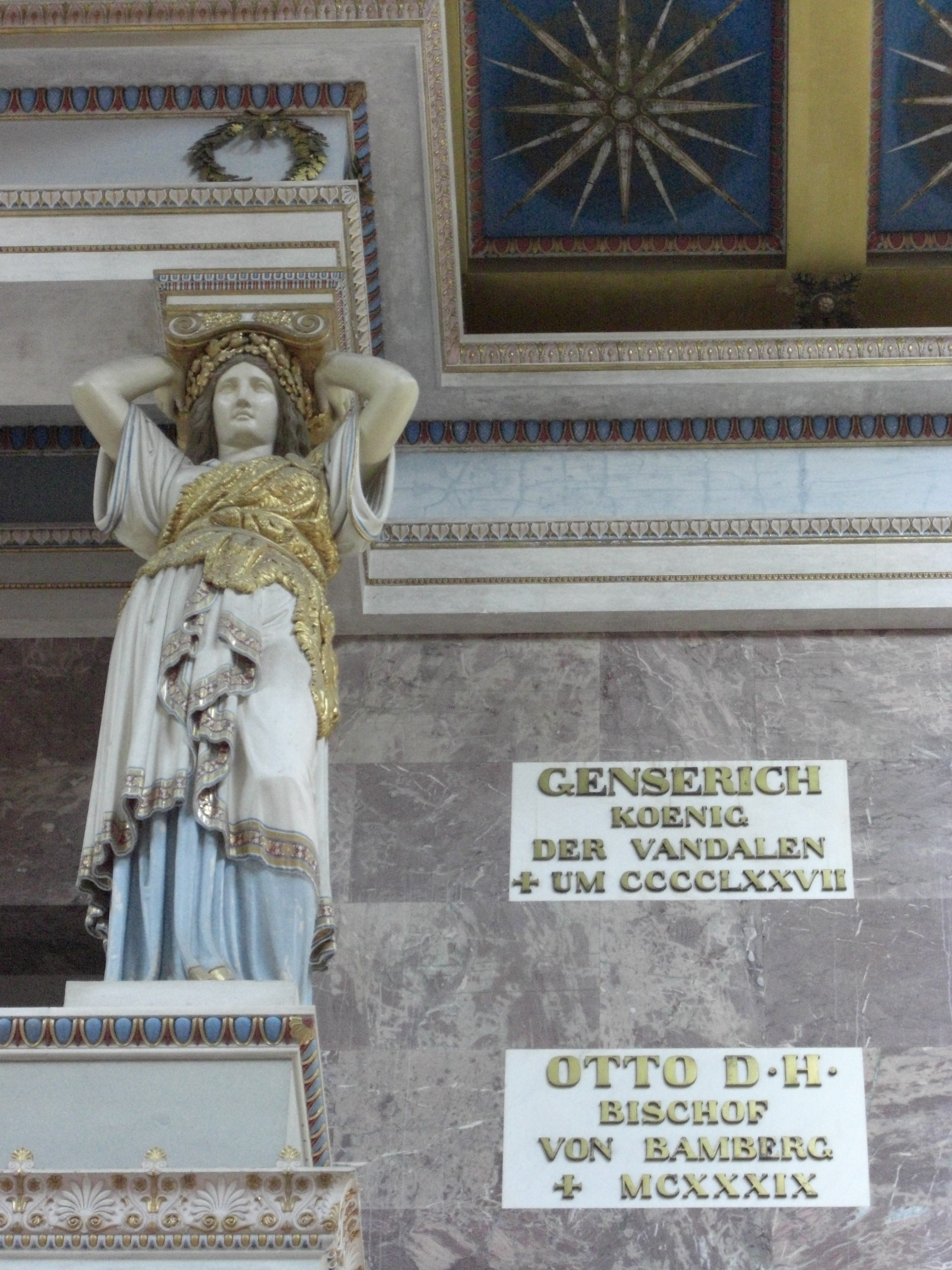 Erinnerung an Geiserich (auch Genserich), um 389 bis 477, König der Vandalen, in der Walhalla in Donaustauf